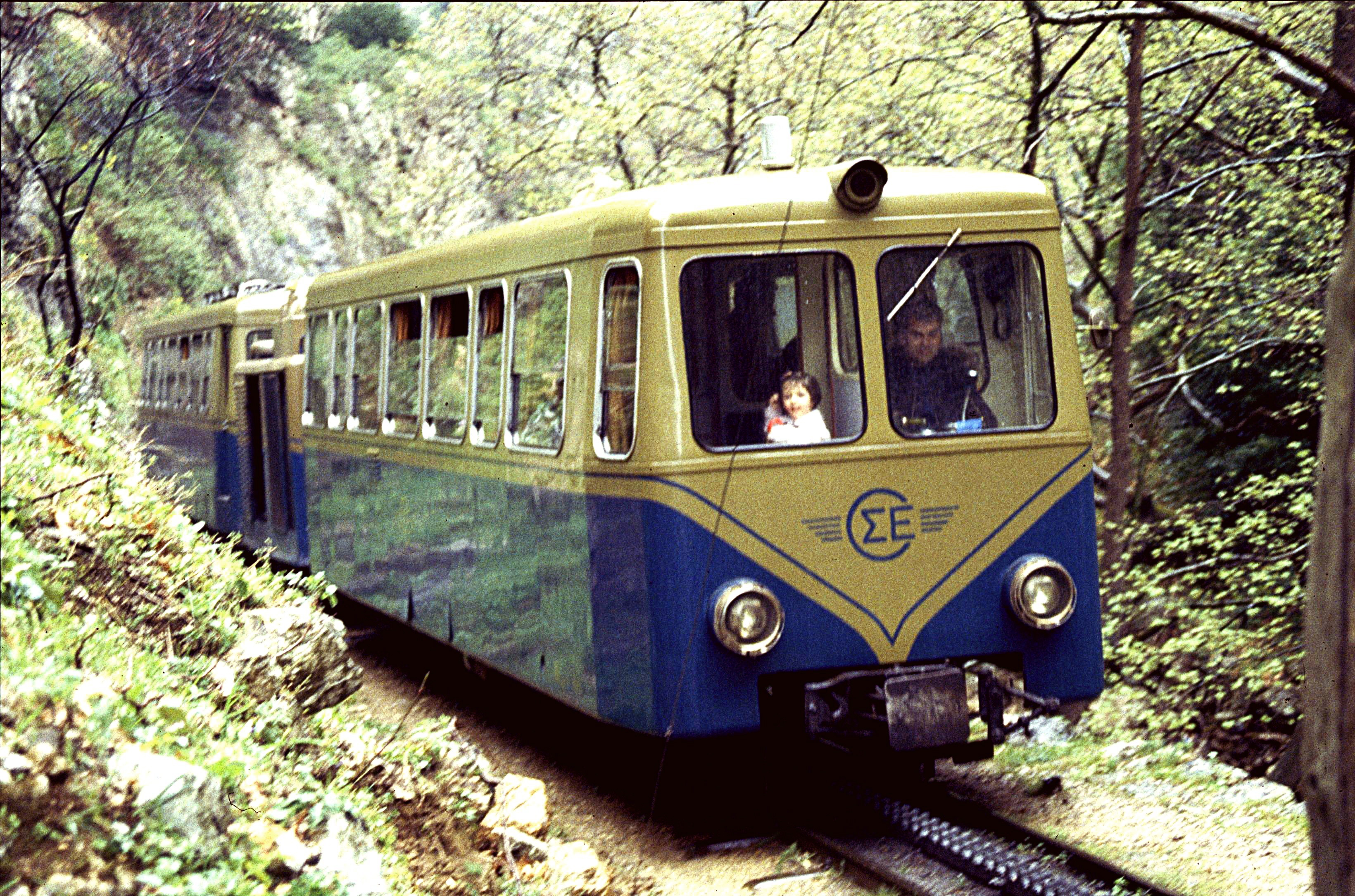 Eisenbahn in der Vouraikos-Schlucht